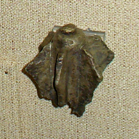 Бронзовое навершие шестопёра, Волжская Болгария, 10-14 в..